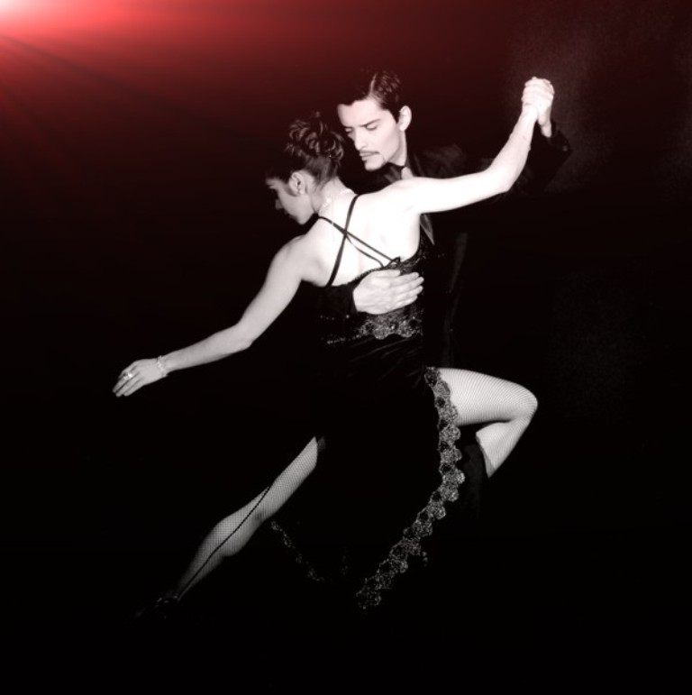 Tango dance, Buenos Aires, Argentina